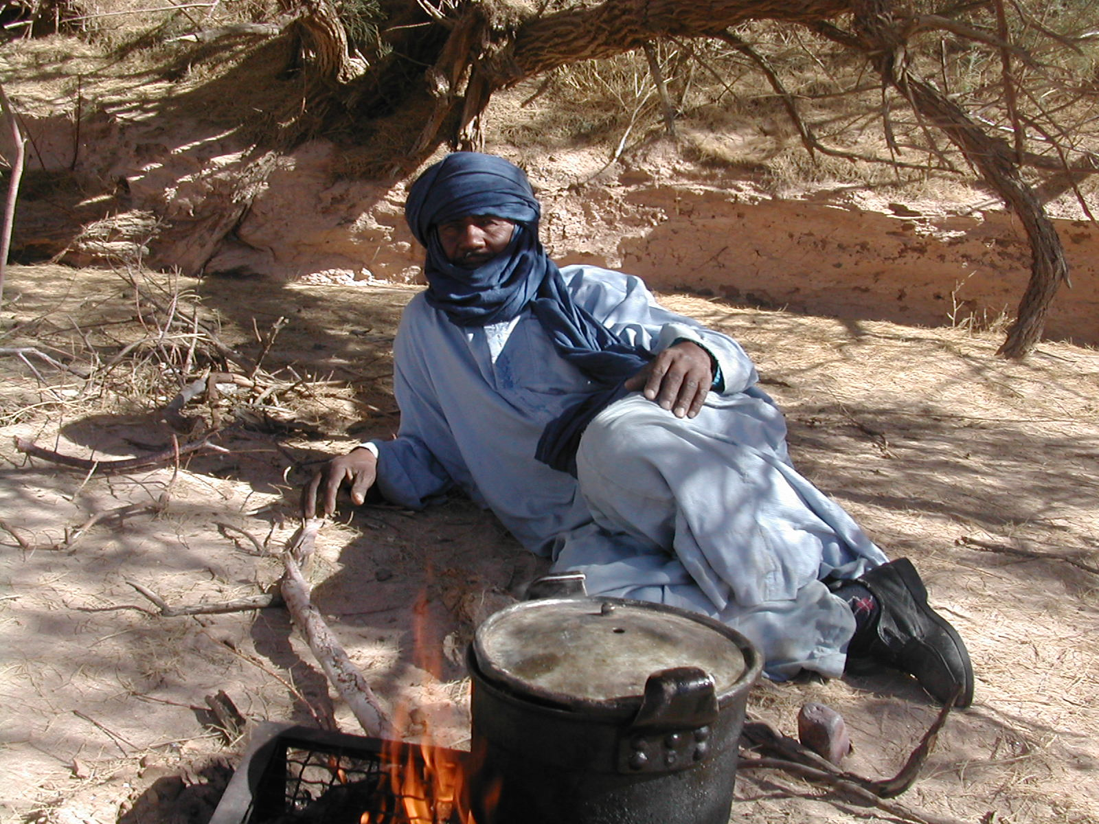 Targui, Algérie